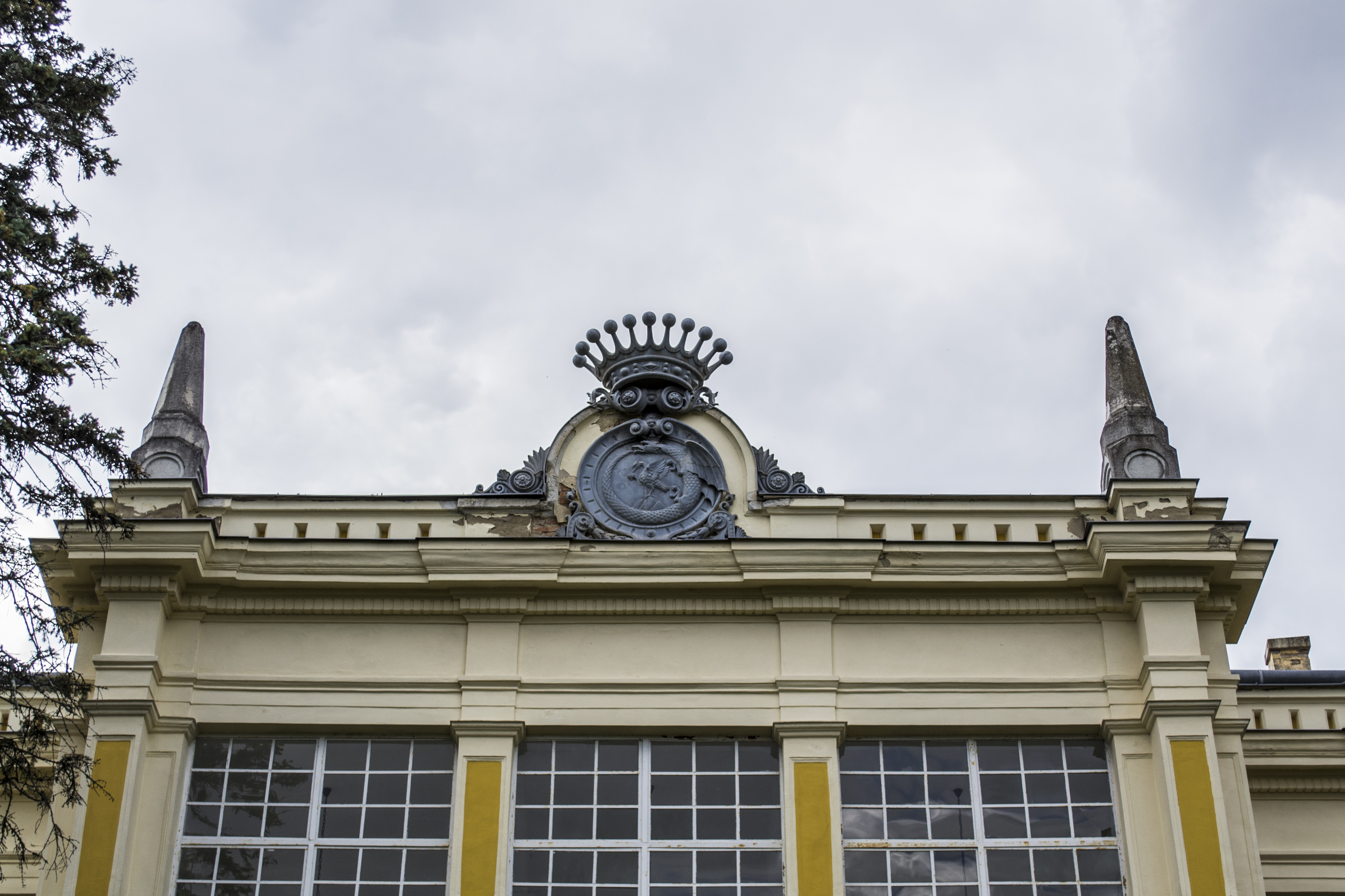 Károlyi-kastélyegyüttes és parkja, Füzérradvány – a Károlyi család címere a kastély homlokzatán This is a photo of a monument in Hungary. Identifier: 2768